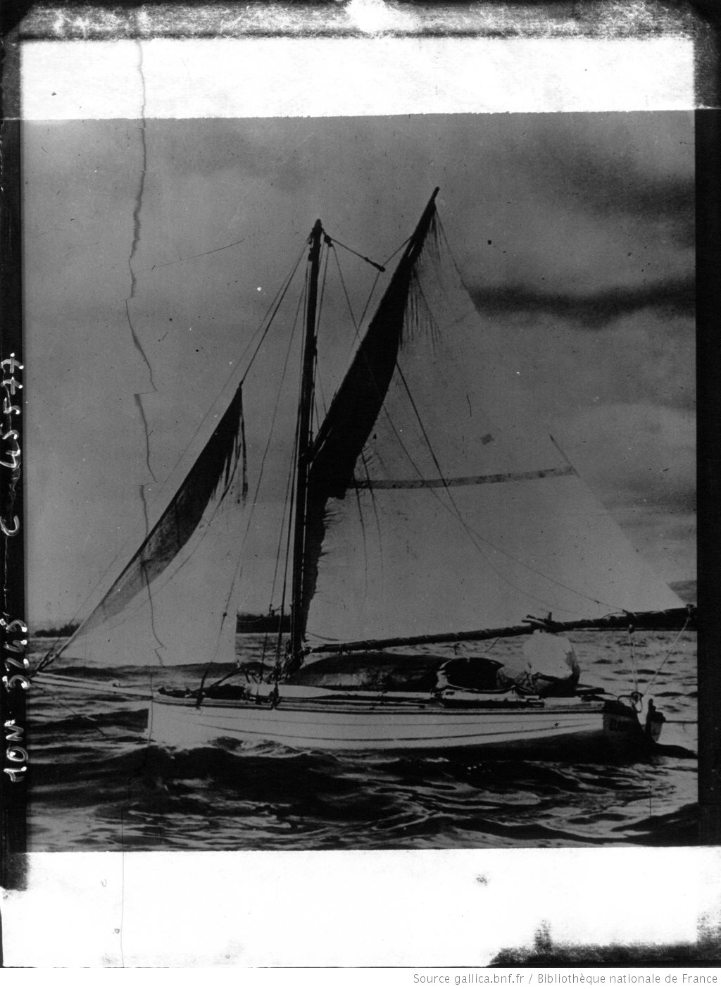 Titre : M. Fred Rebell, (portrait) qui a fait Australie-Los Angeles sur son petit skiff, de 6 mètres : [photographie de presse] / Acmé Auteur : Acme Newspicture (Agence de presse). Agence photographique Éditeur : diff. par l'Agence Mondial (Paris) Date d'édition : 1932 Type : image fixe Format : 1 photogr. nég. sur verre ; 13 x 18 cm (sup.) Format : image/jpeg Description : Référence bibliographique : Mondial, 5245 Description : Appartient à l’ensemble documentaire : Pho20MPP Description : Image de presse Droits : domaine public Identifiant : ark:/12148/btv1b90494010 Source : Bibliothèque nationale de France, département Estampes et photographie, EI-13 (2977) Couverture : 19 novembre 1932 Relation : Notice de recueil : Relation : Appartient à : [Recueil. Actualités 1932-11**1932-12. Agence Mondial MON 5046-6040] Notice du catalogue : Provenance : Bibliothèque nationale de France Date de mise en ligne : 11/04/2011